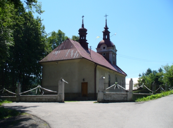 Palcza, rzymskokatolicka parafia pw. Matki Boskiej Wspomożenia Wiernych